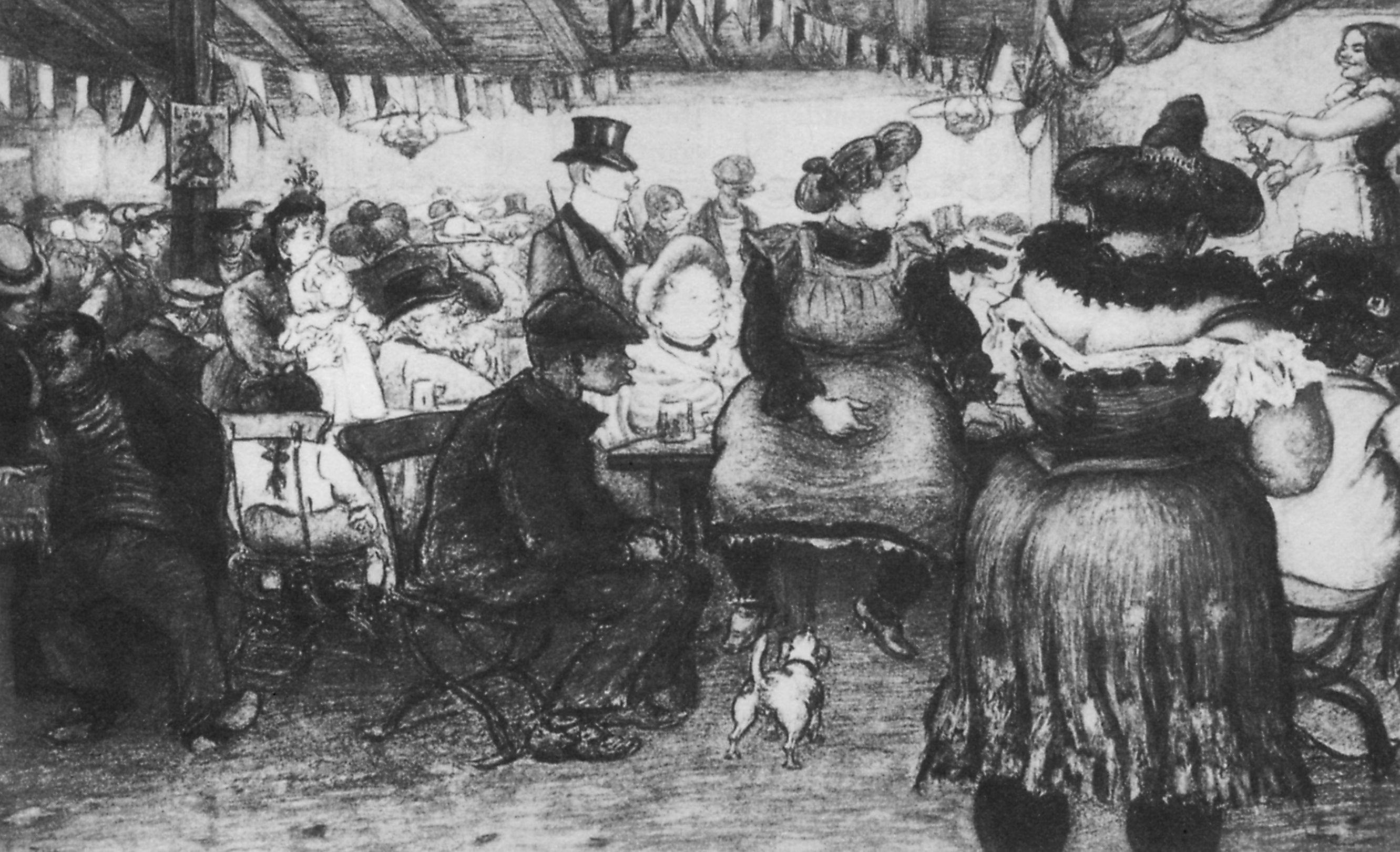 Zeichnung einer Tingeltangelvorstellung in Berlin um 1900 von Heinrich Zille.